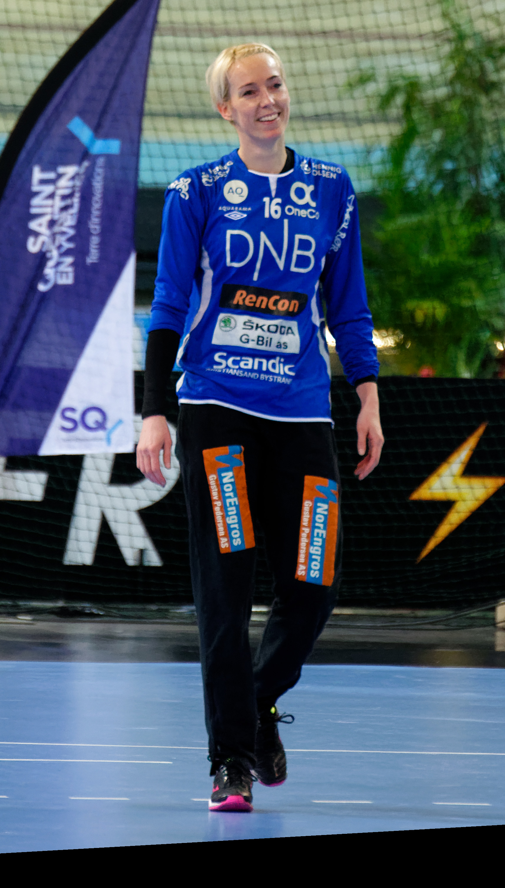 Rencontre du tour principal de coupe EHF entre Issy Paris Hand et les norvégiennes de Vipers Kristiansand au vélodrome de Saint-Quentin en Yvelines, le 03 février 2018.